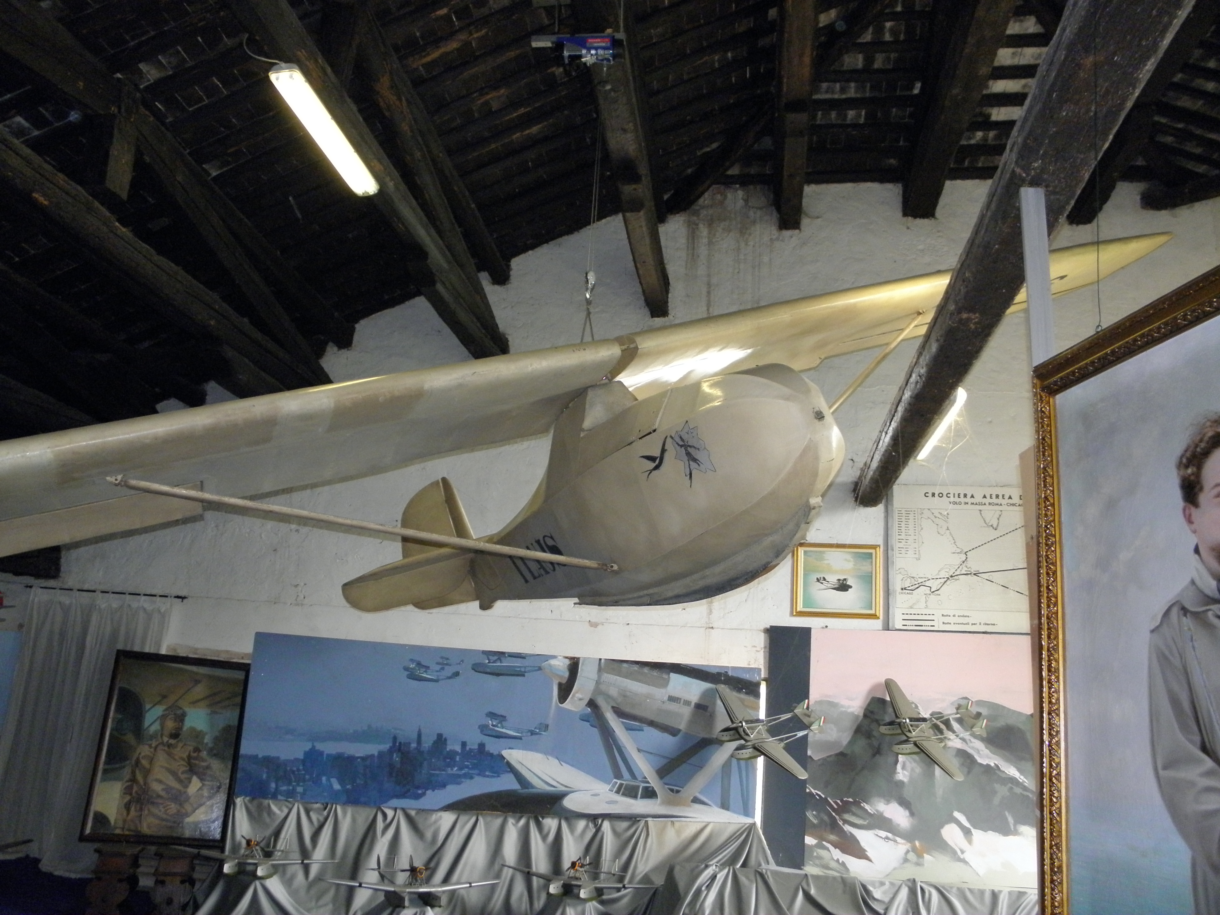 San Pelagio, frazione di Due Carrare: Museo dell'aria e dello spazio, l'aliante acrobatico CAT 20 esposto nel museo.